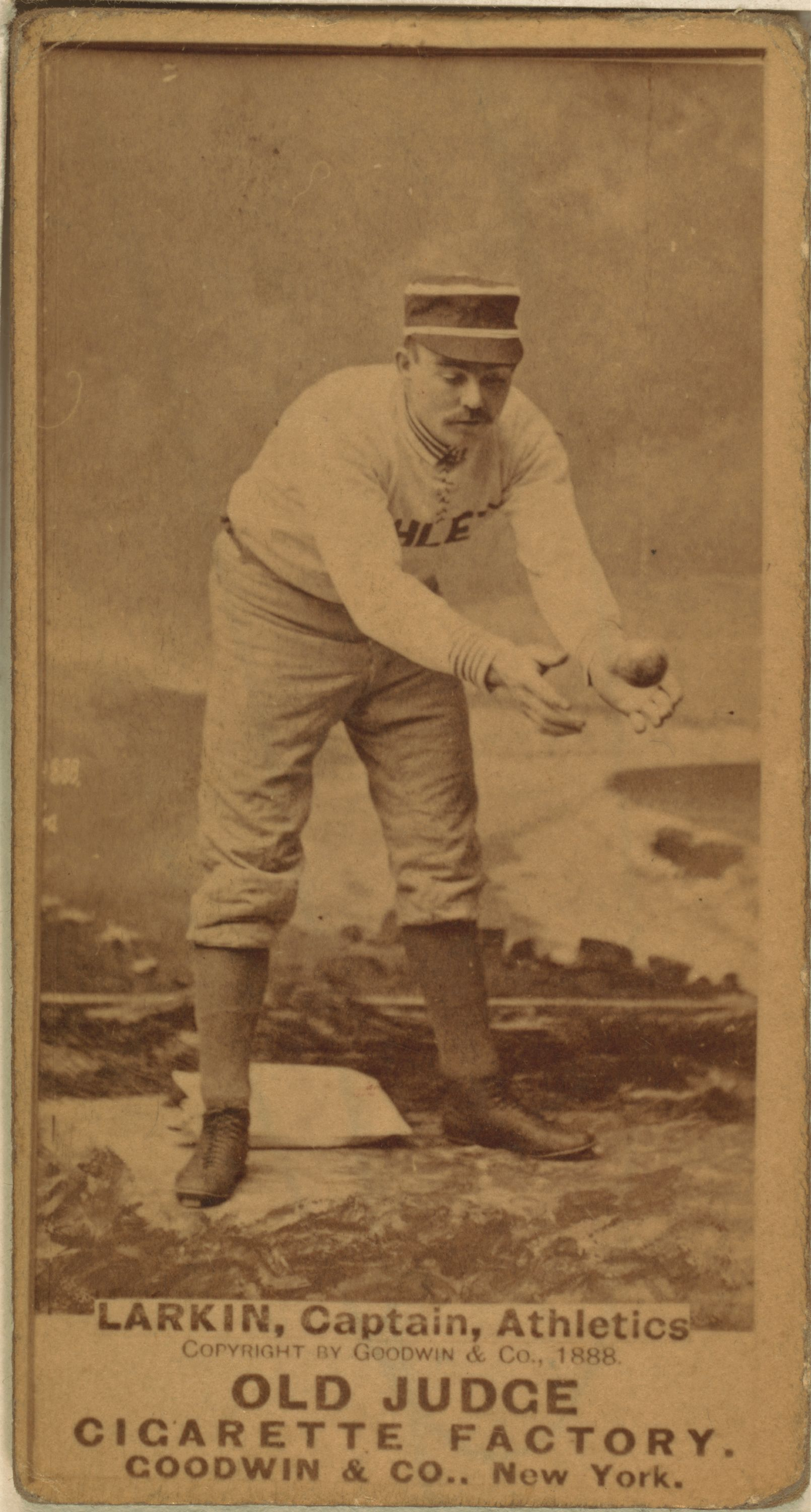 Henry Larkin